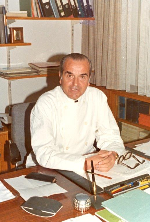 Professor Haunfelder an seinem Schreibtisch